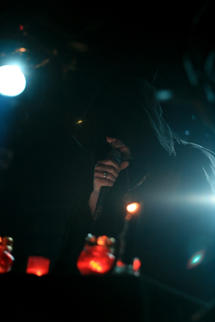 Attila Csihar actuando con su proyecto en solitario Void Ov Voices.